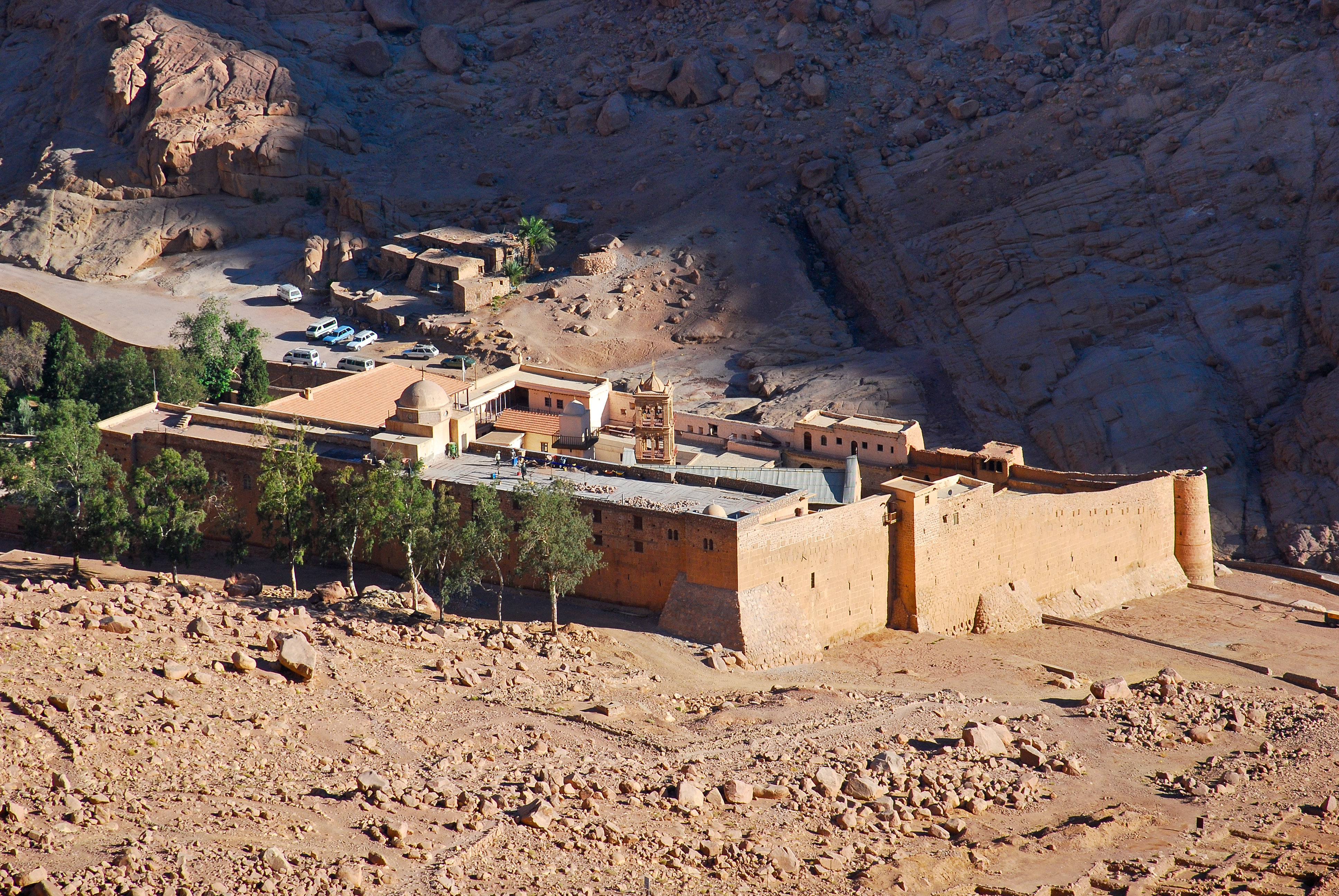 يقع دير سانت كاترين في جنوب سيناء بمصر أسفل جبل كاترين أعلى الجبال في مصر، بالقرب من جبل موسى. ويقال عنه أنه أقدم دير في العالم، يعد مزارا سياحيا كبيرا، حيث تقصده أفواج سياحية من جميع بقاع العالم، وهو معتزل، يديره رئيس الدير وهو أسقف سيناء، والذي لا يخضع لسلطة أية بطريرك أو مجمع مقدس ولكن تربطه علاقات وطيدة مع بطريرك القدس لذلك فإن اسم بطريرك القدس يذكر في القداسات، على الرغم من أن الوصاية على الدير كانت لفترات طويلة للكنيسة الأرثوذكسية الروسية، ورهبان وكهنة الدير من اليونانيين وليسوا عربًا أو مصريين، شأنهم شأن أساقفة كنيسة الروم الأرثوذكس في القدس التي يسيطر عليها اليونانيين من عهود طويلة. وأسقف سيناء يدير إلى جانب الدير الكنائس والمزارات المقدسة الموجودة في جنوب سيناء في منطقة الطور وواحة فيران وطرفة.